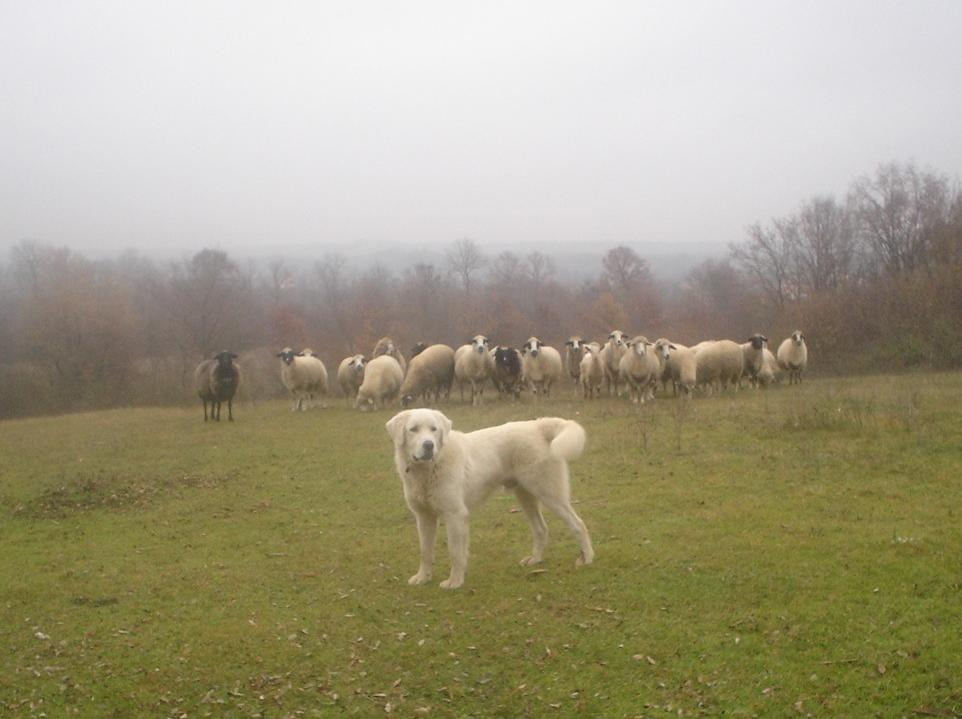 Dog